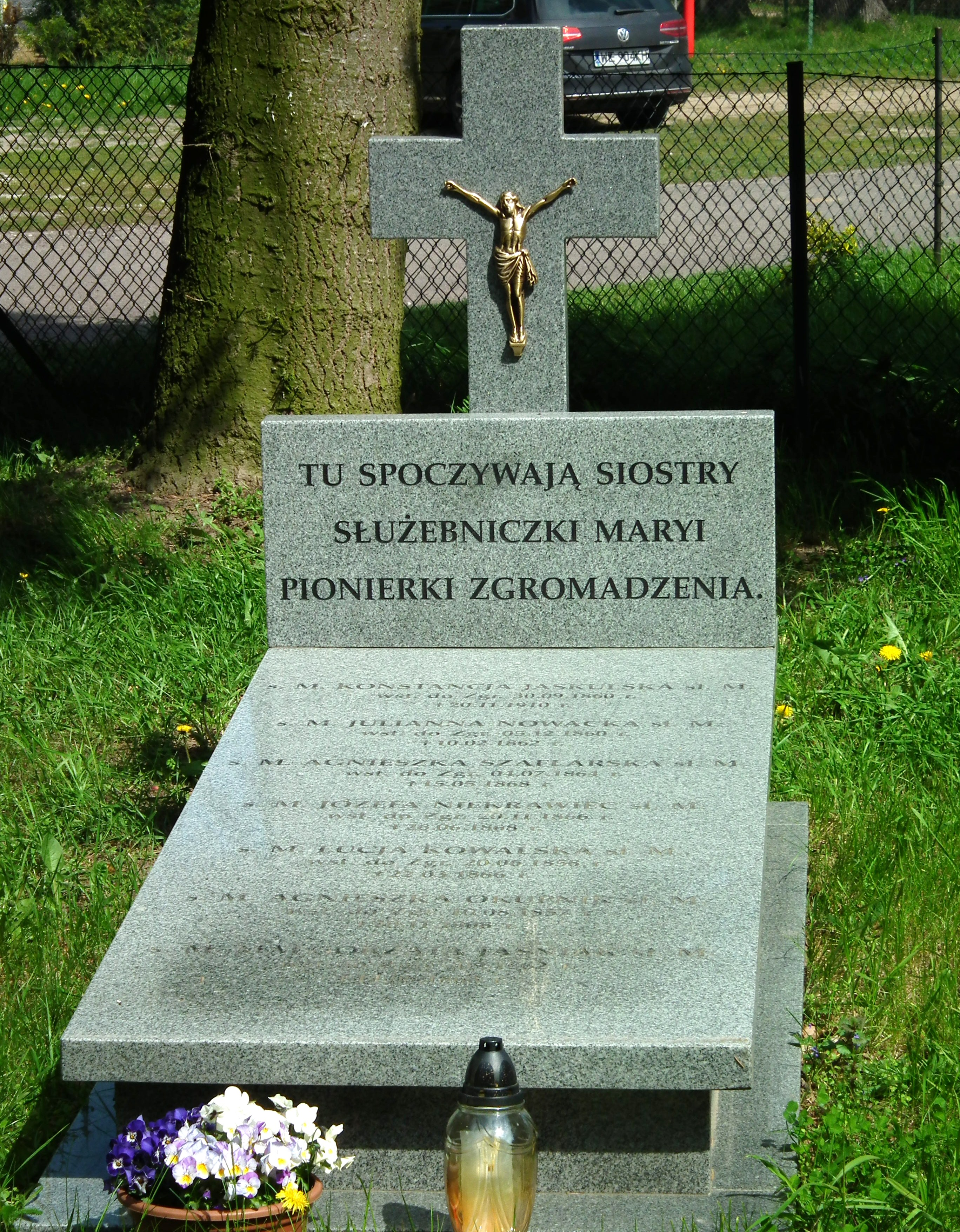 Kościół św. Barbary w Jaszkowie.